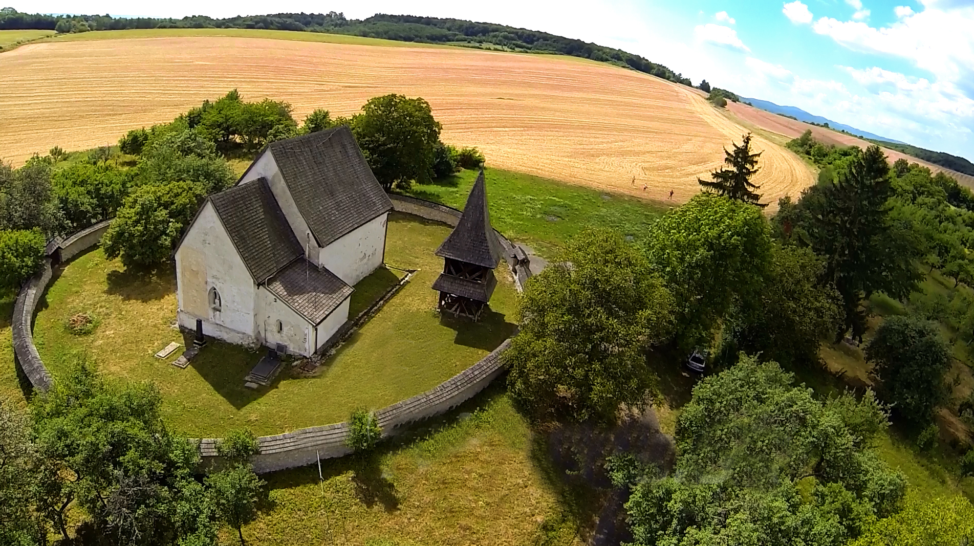 Kostol